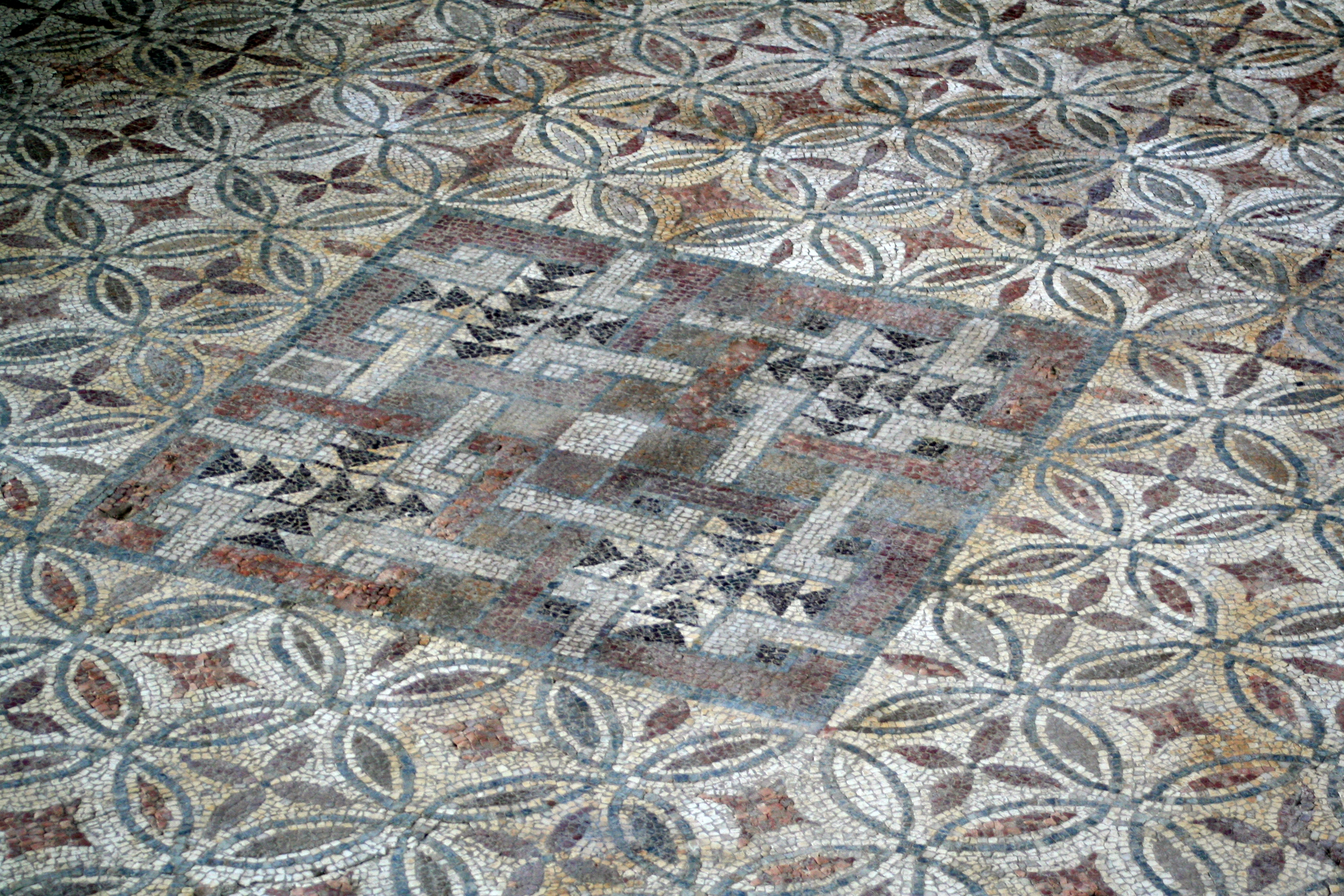 Fußbodenmosaik in der römerzeitlichen Villa in St. Pauls